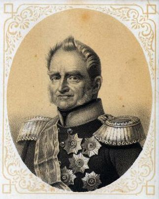 Генріх Ангальт-Кетенський